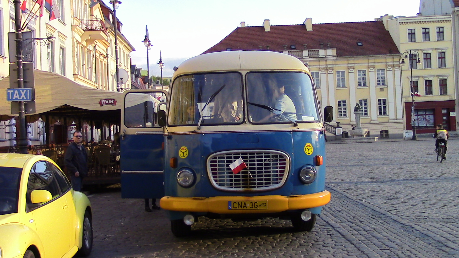 Stary Rynek Bydgoszcz